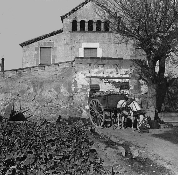 Casa Alòs a Santa Eulàlia. Josep Salvany i Blanch (1923)